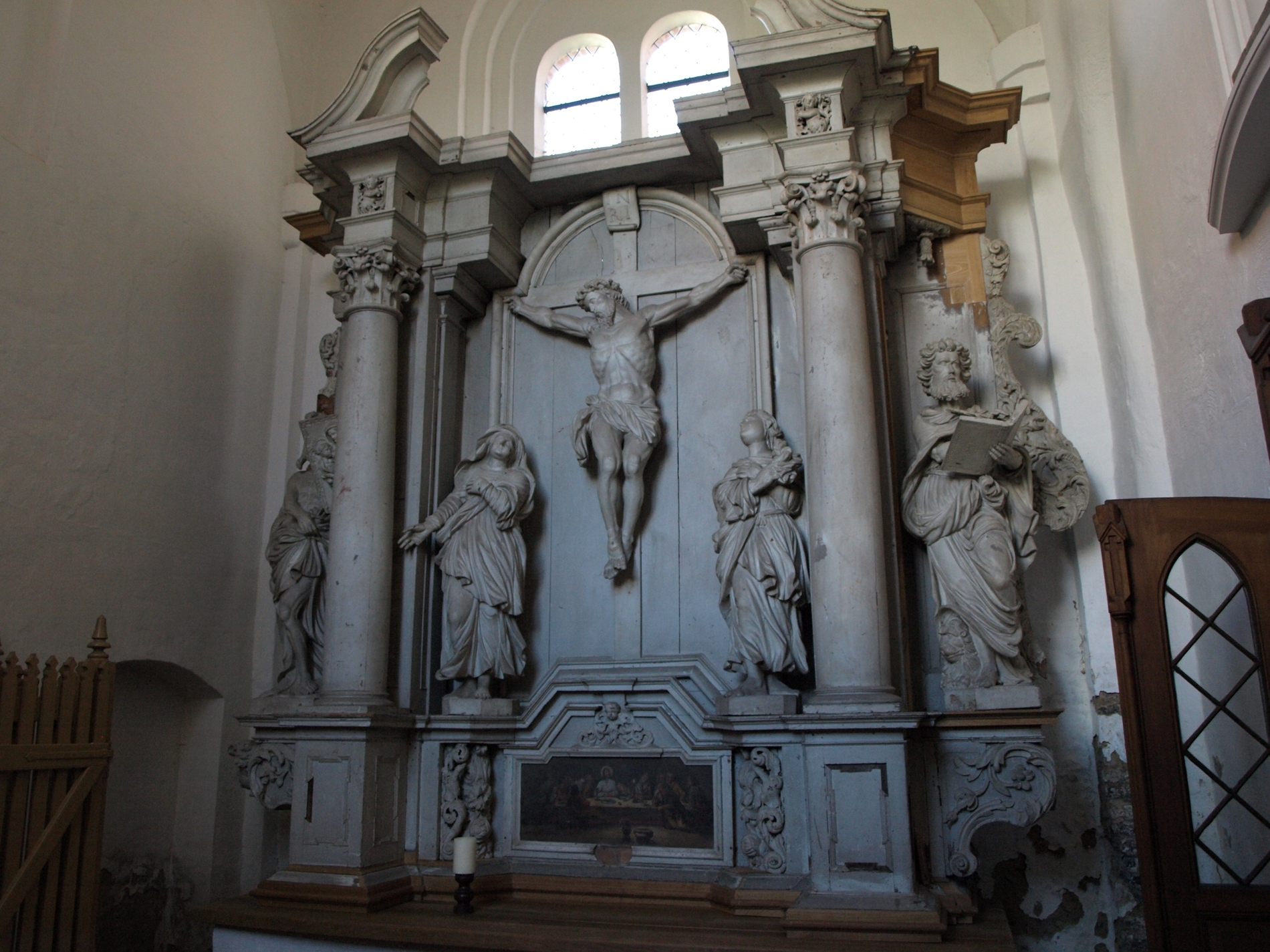 Boizenburger Kirche Barock Altar